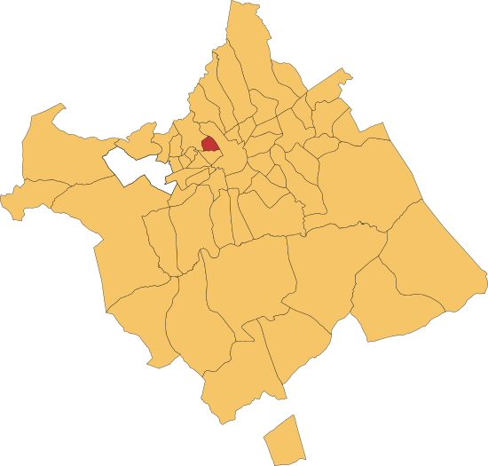 Hecho por mi